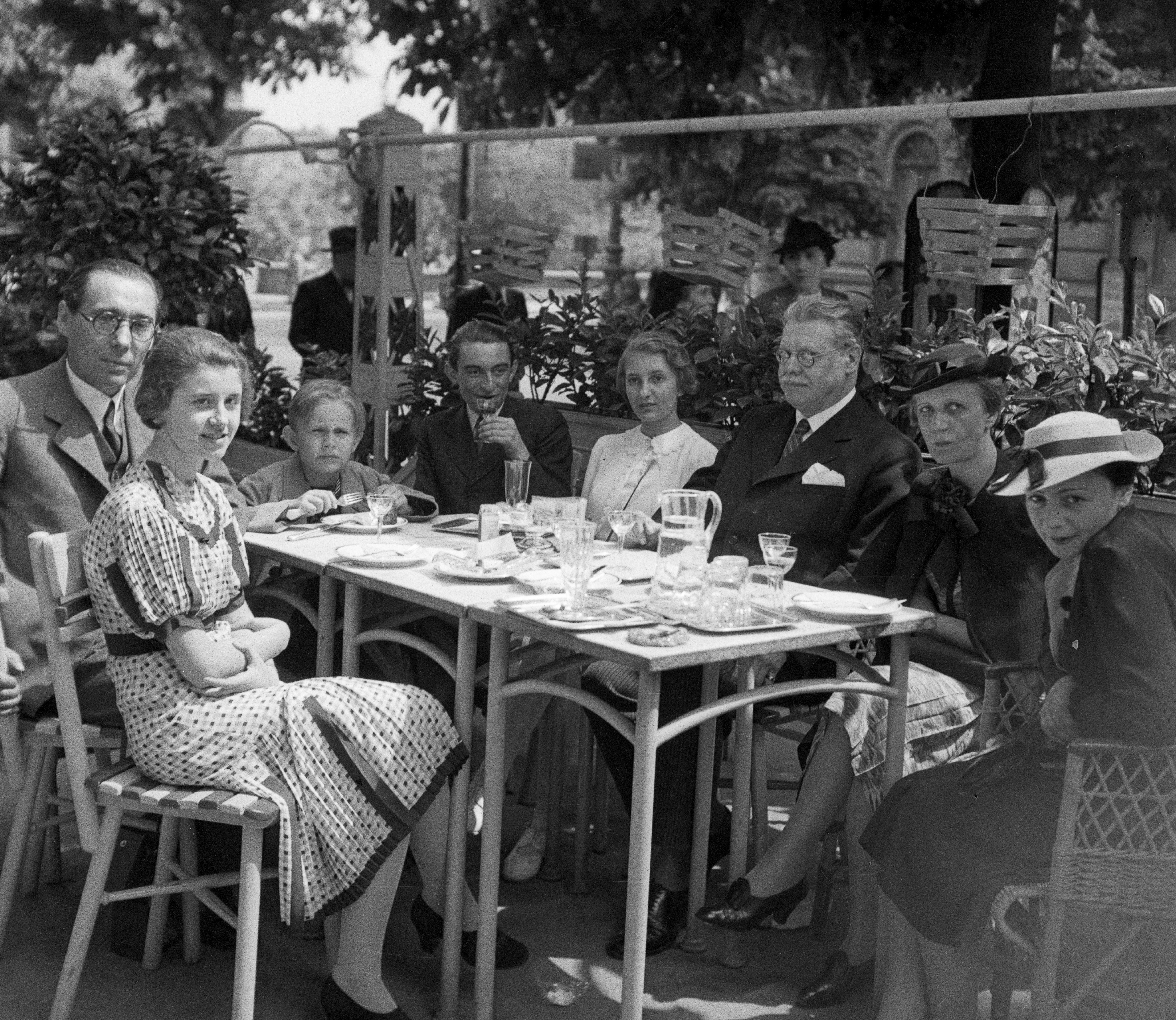 Clark Ádám tér, Lánchíd kávéház terasza. Balra Szabó Lőrinc költő. Location: Hungary, Budapest I. Tags: tableau, coffe house, garden furniture, jug, glass, place, wicker chair, hat, glasses, Budapest Title: Clark Ádám tér, Lánchíd kávéház terasza. Balra Szabó Lőrinc költő.